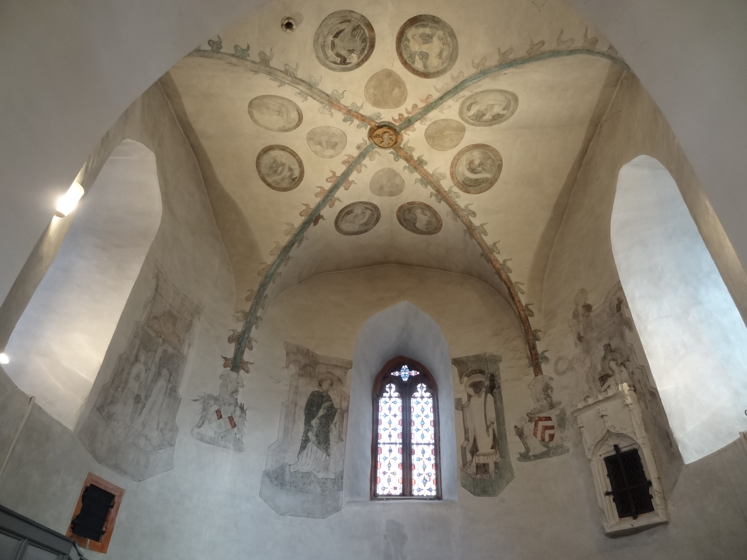 Evangelische Pfarrkirche (Hoch-Weisel)